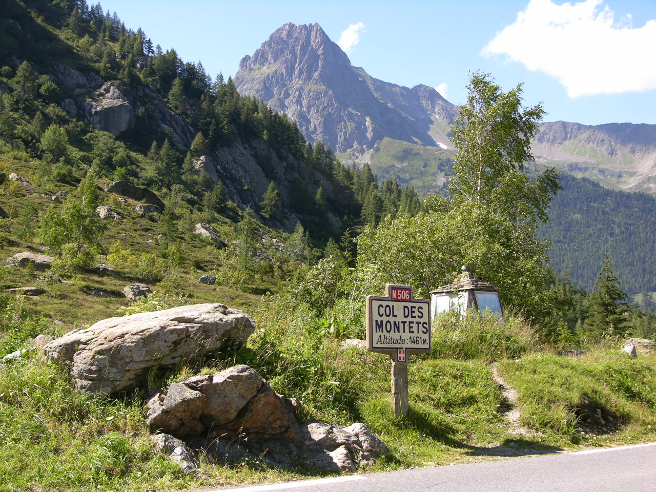 Col des Montets, France, avec en arrière-plan les Cornes de Loriaz (2726m)